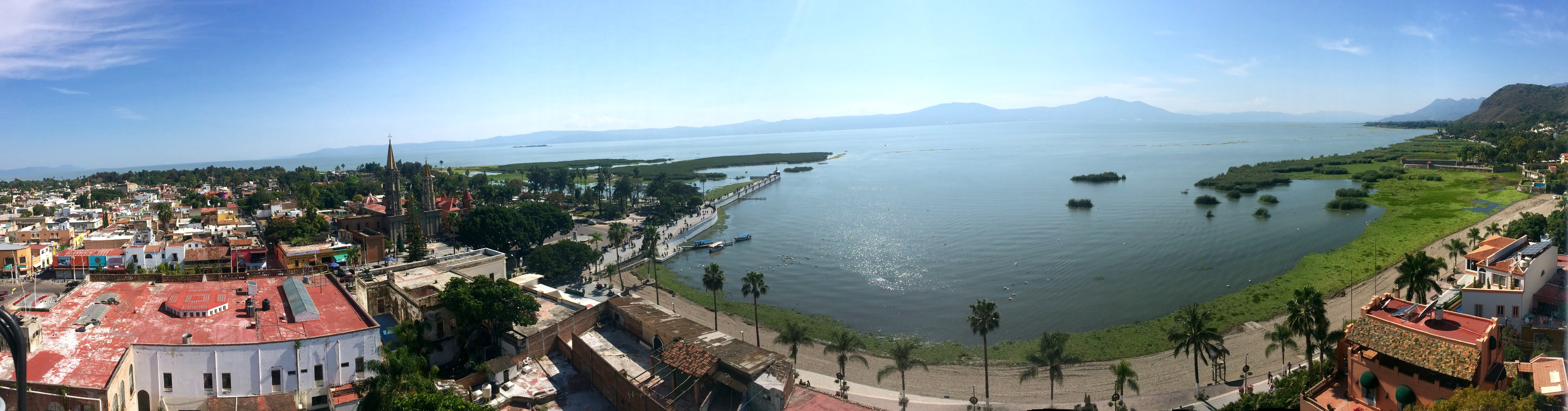 Panorámica a 25 metros de altura en el municipio de Chapala, Jalisco. Con su laguna en la mayor vista, un poco del lugar y la iglesia de San Francisco.